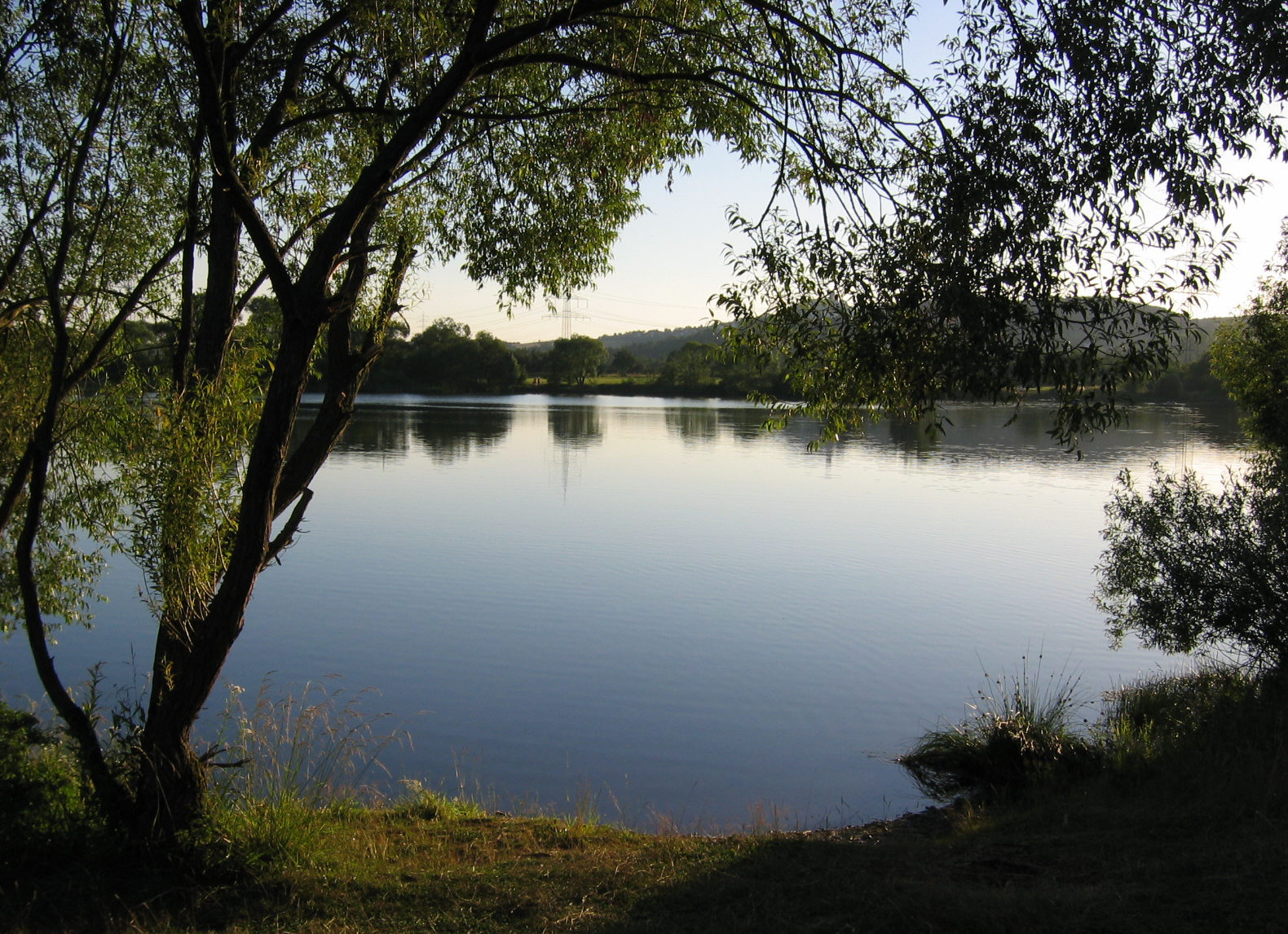 Launsbacher Seen (Privatarchiv)